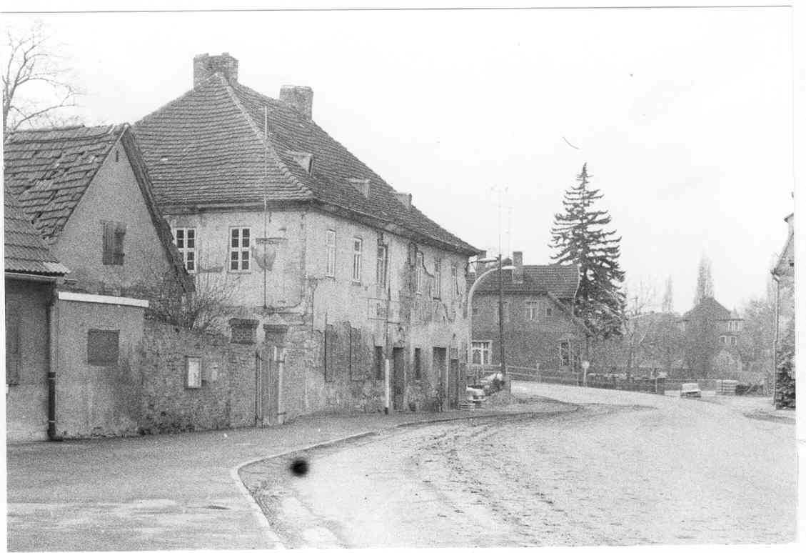 Fährhof (Aufnahme im 19. Jh.) (eigene Arbeit)